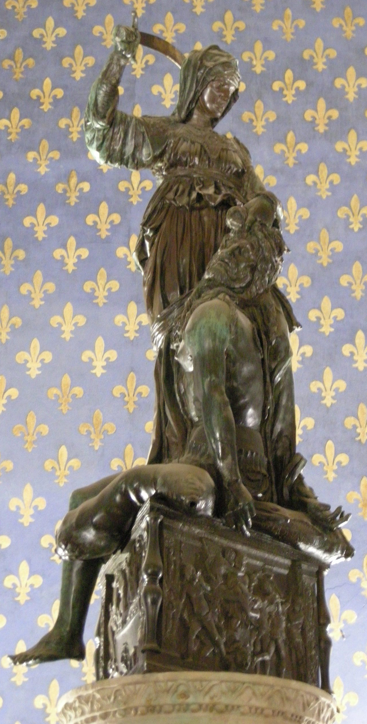 Giuditta di donatello